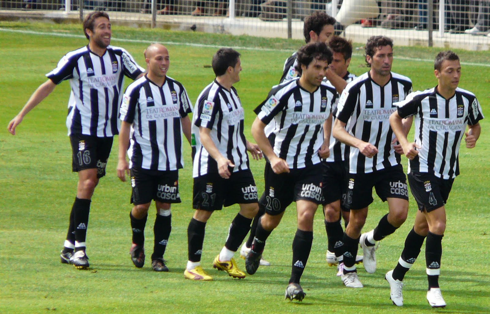 Jugadores del FC Cartagena celebrando un gol, temporada 2009-10 de la Liga Adelante (España). Aparecen en primer término: Falcón (dorsal 16), Lafuente (dorsal 11), Víctor (dorsal 21), Etxeita(dorsal 20), Mariano Sánchez (dorsal 6) y Txiqui (4). Al fondo, De Lucas y Toché.